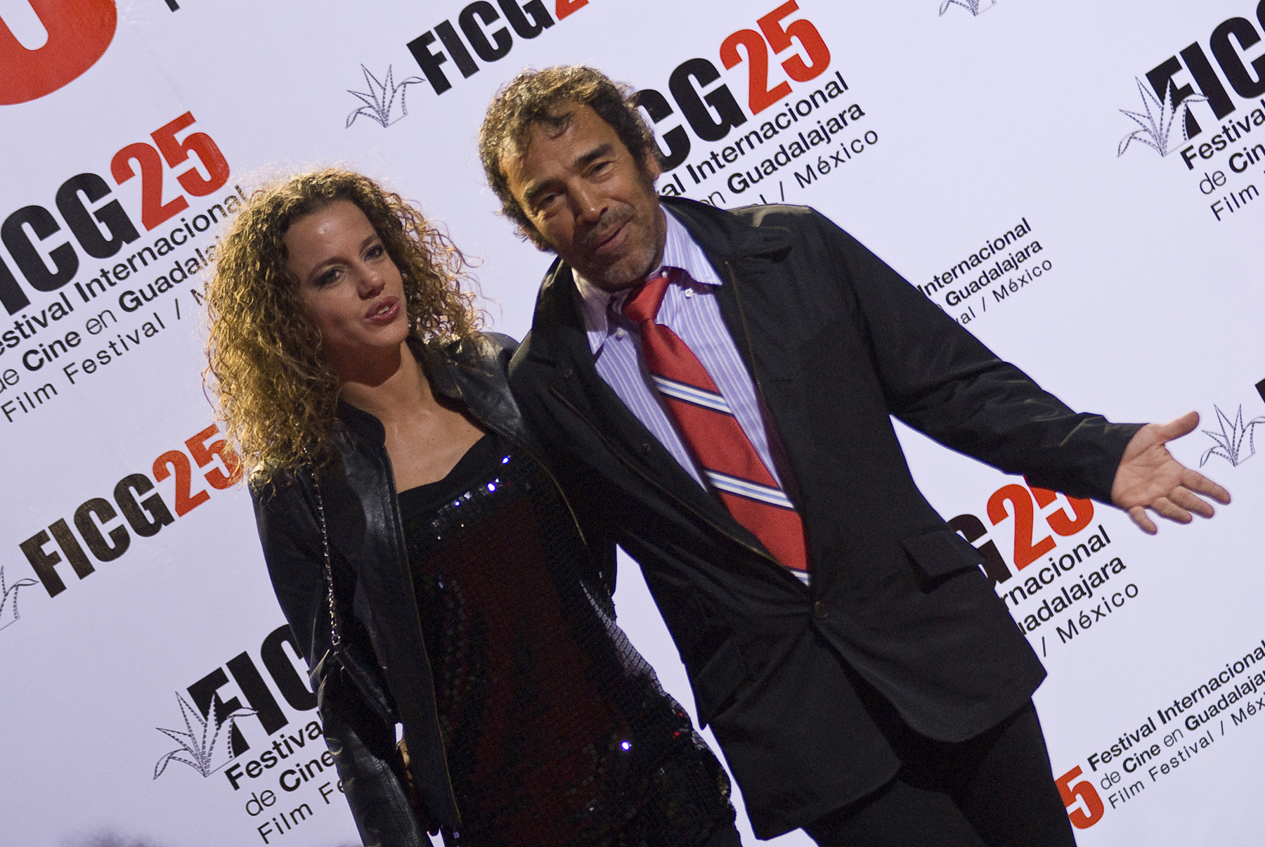 Damián Alcazar en la Alfombra Roja previa a la Ceremonia de Premiación y la Gala de Clausura, en el marco de las actividades del Festival Internacional de Cine de Guadalajara en su edición 25. 19 de Marzo, 2010. Guadalajara, México. © Cortesía FICG25 / Gonzalo García Ramírez.